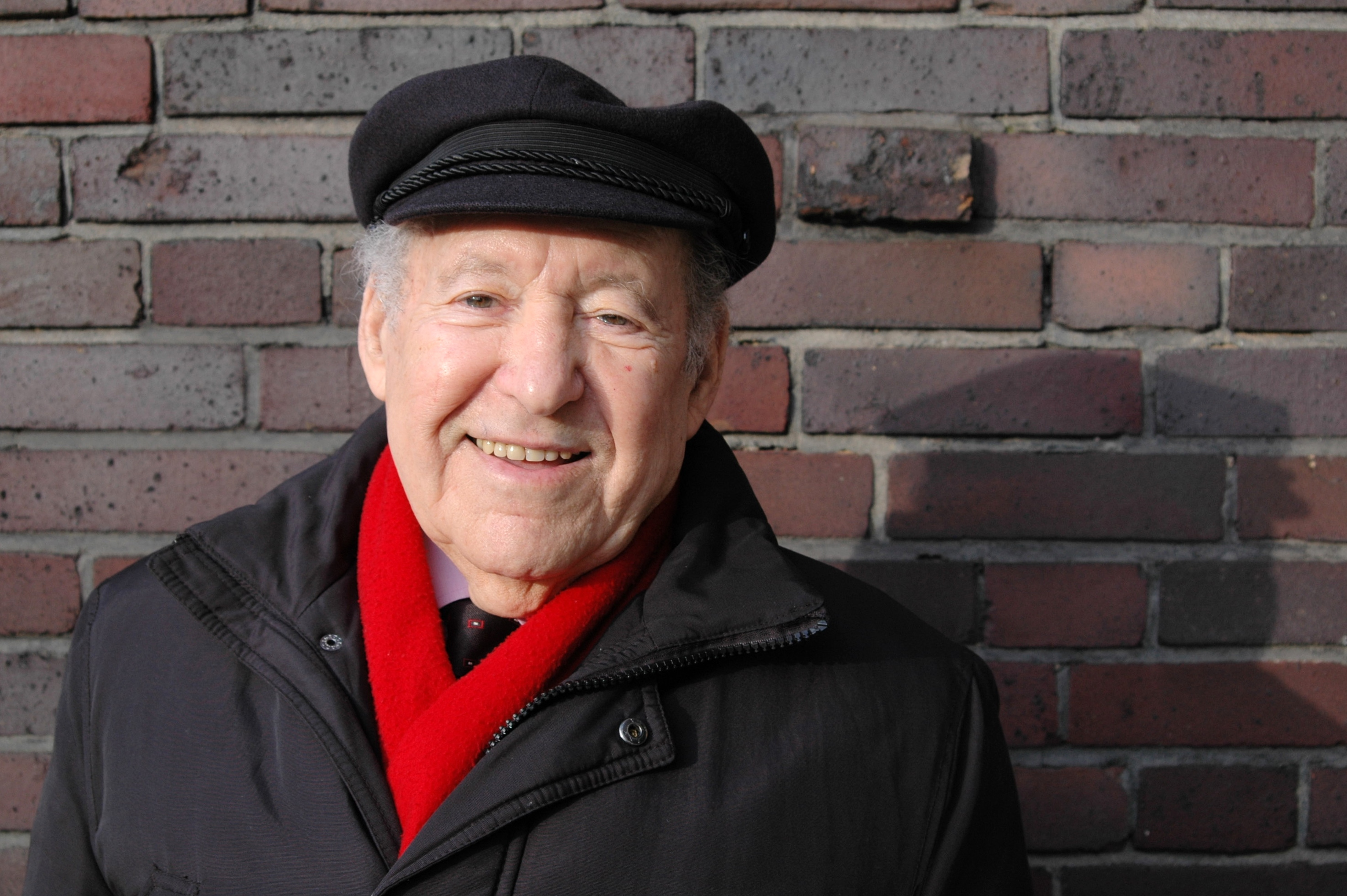 Sally Perel vor dem Rathaus Oberhausen